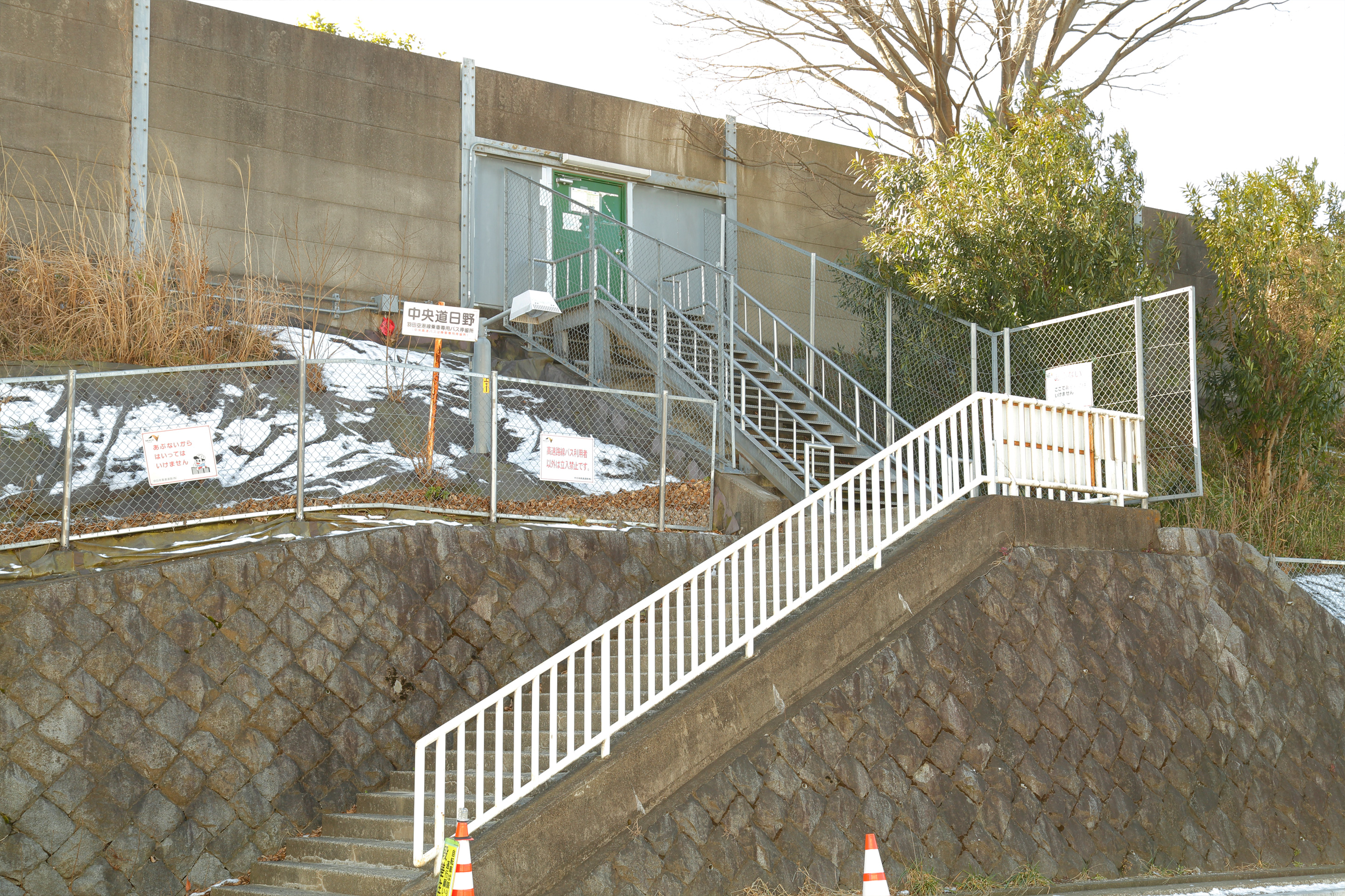 東京都ja:日野市にあるja:日野バスストップの上り乗車場入り口。